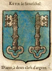 Keux le Sénéchal